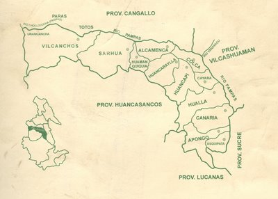 Este mapa es una copia del mapa oficial de la provincia de Fajardo del departamento de Ayacucho en Perú. Es un escaneo de un folder de un congreso fajardino. Es un trabajo institucional.